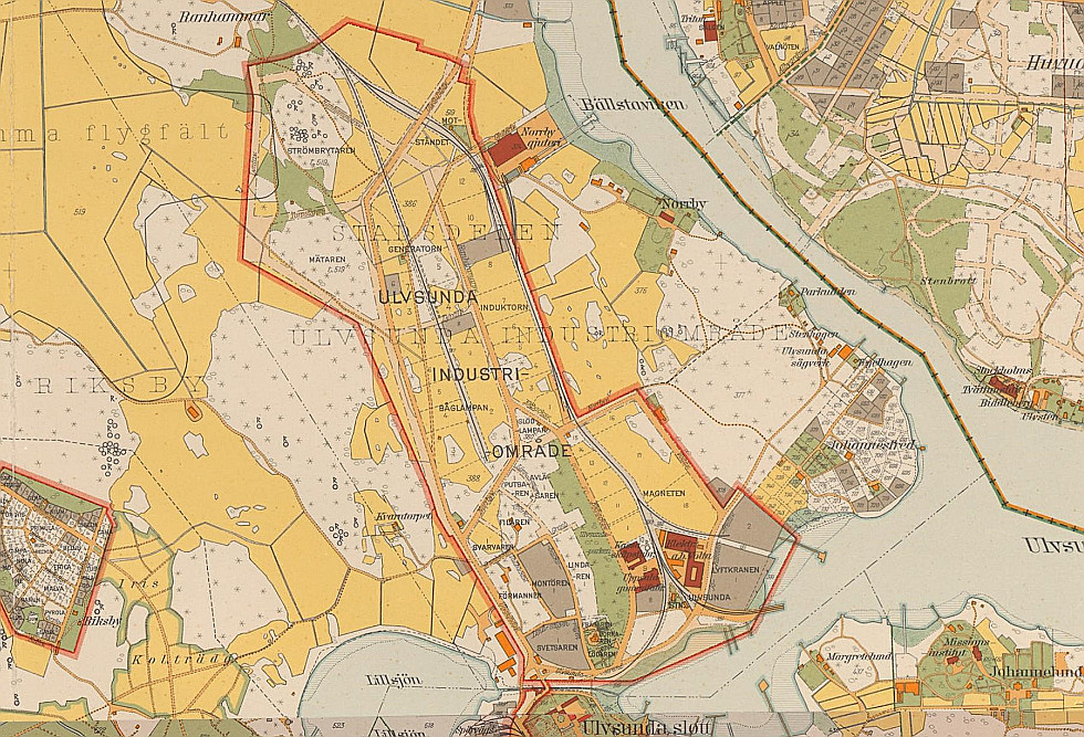 Del av 1934 års karta över Stockholm med omgivningar visande Ulvsunda industriområde.